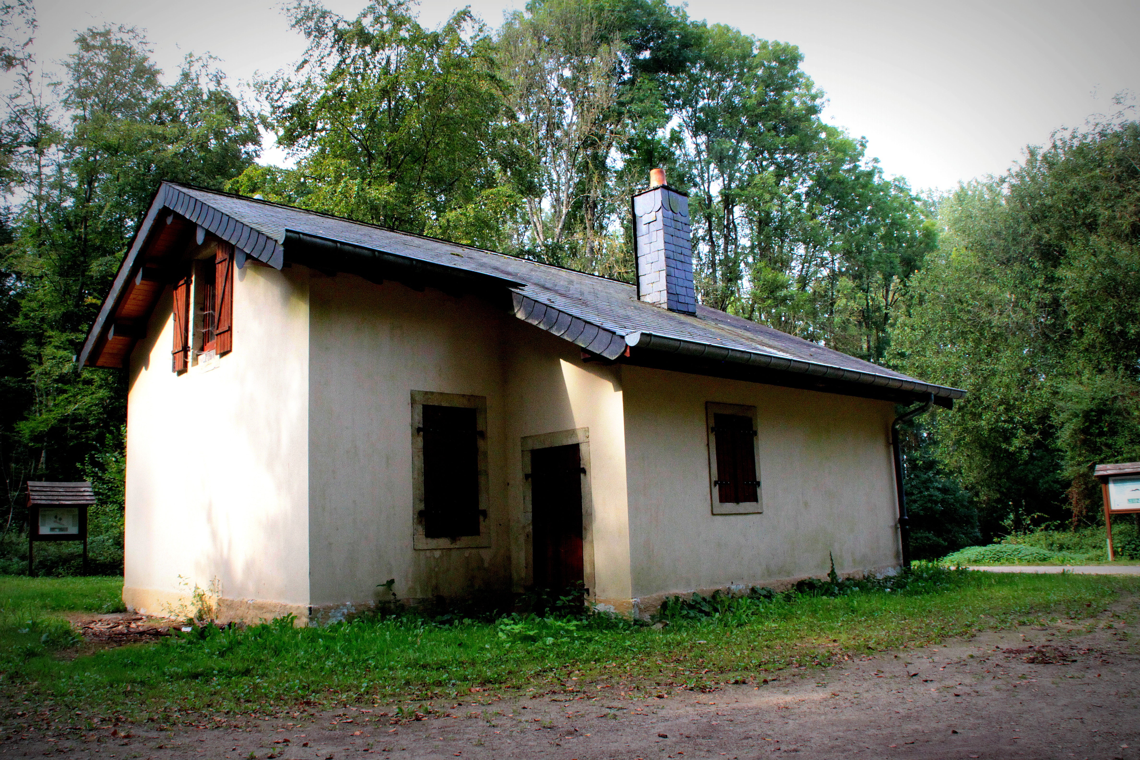 Dat fréiert Gardshaischen an der Neidréisch